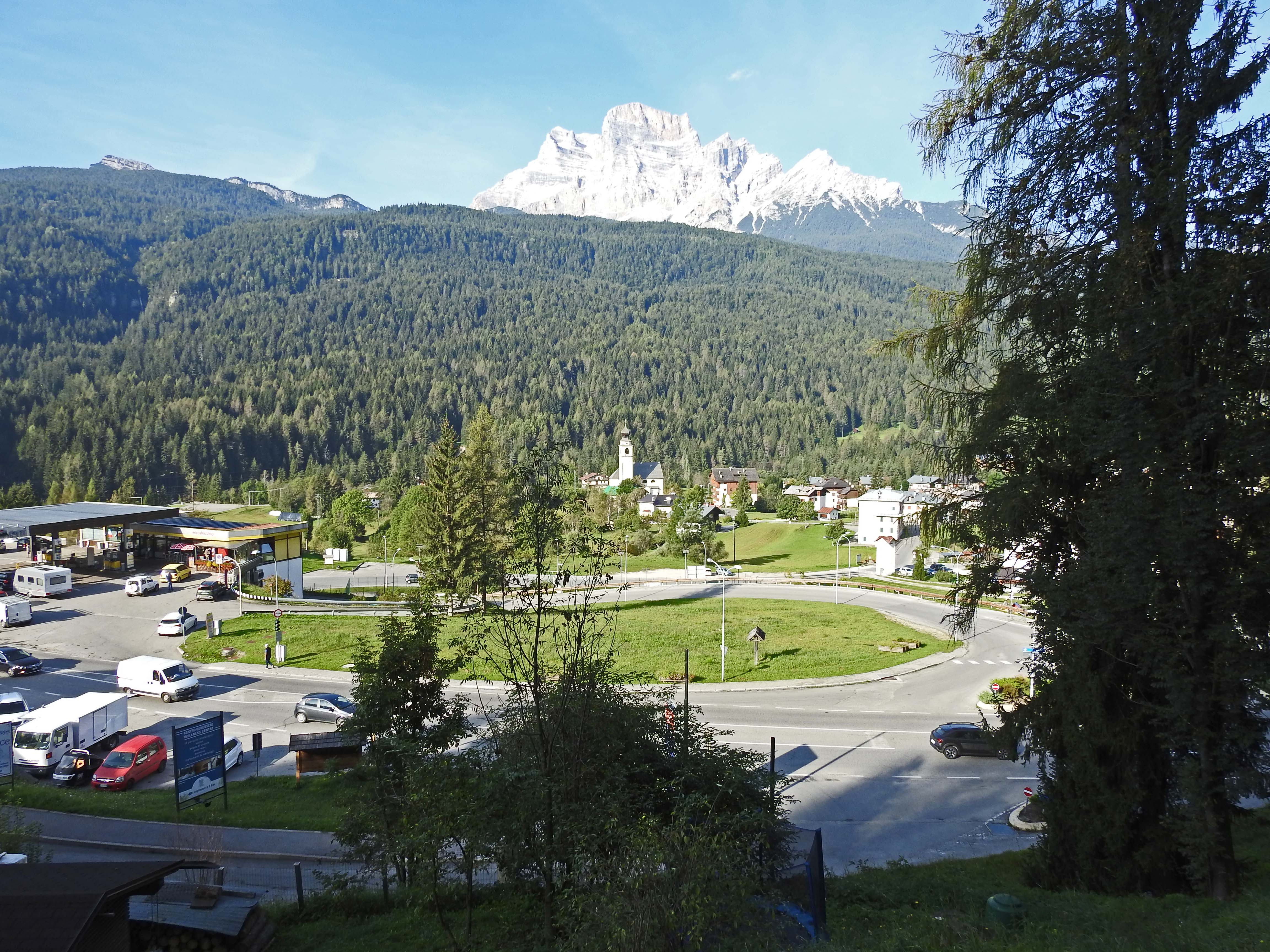 Borca di Cadore mit der Spalla